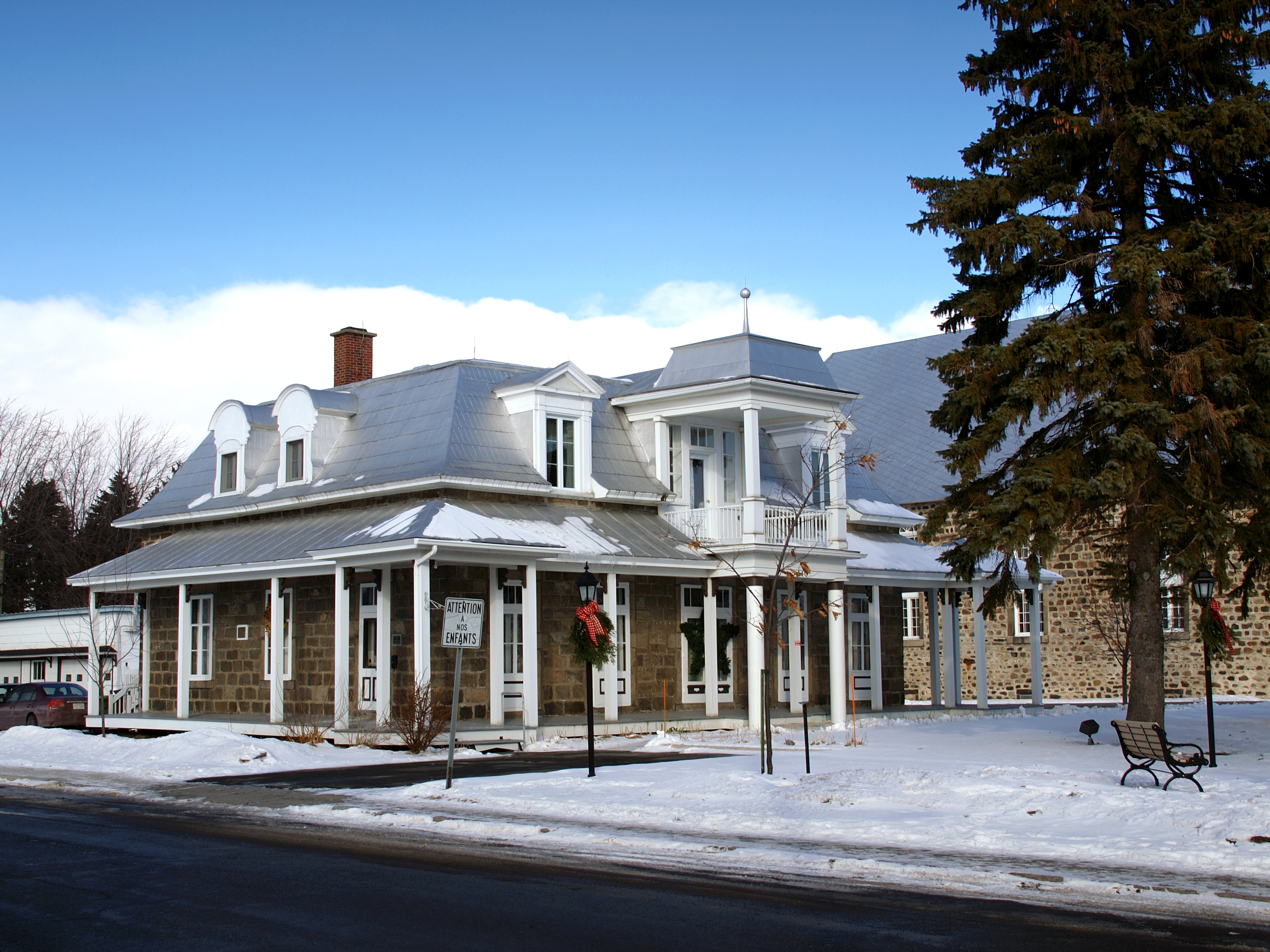 Saint-Damase, Montérégie (Québec) - Presbytère de Saint-Damase